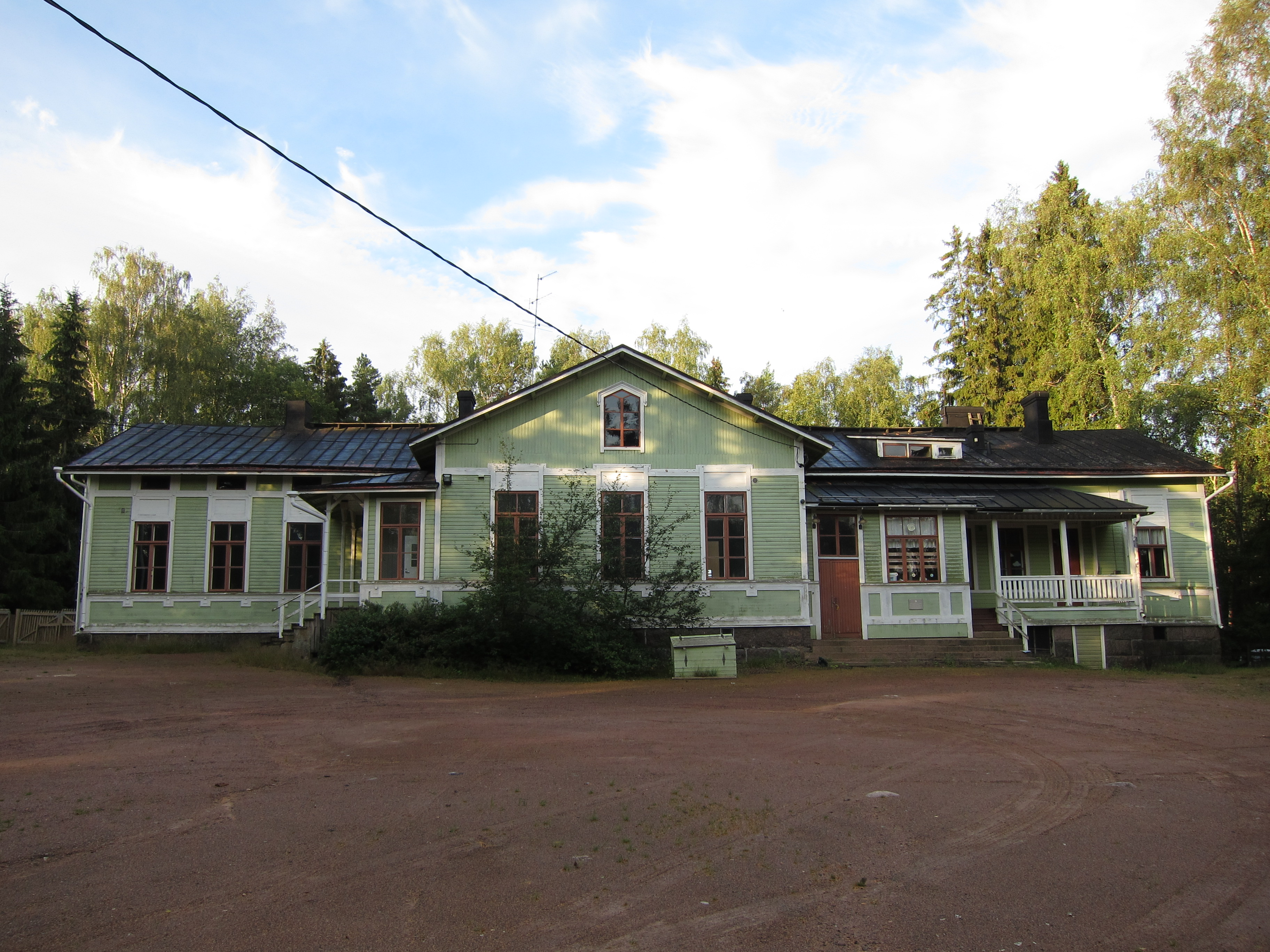 Mussalon vanha puukoulu Kotkassa.